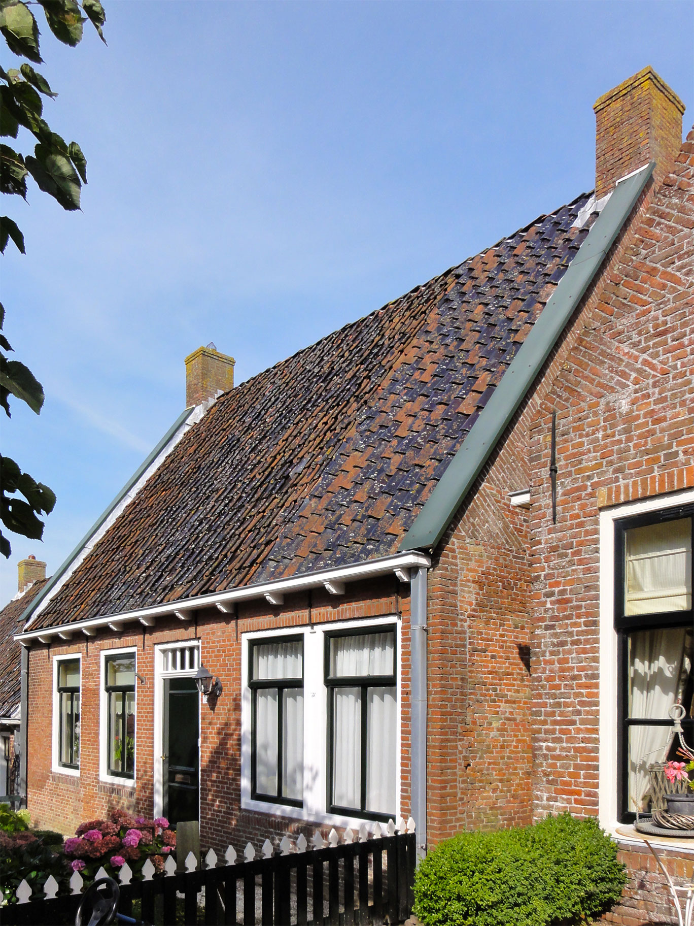 Greate Loane 9 in Ee